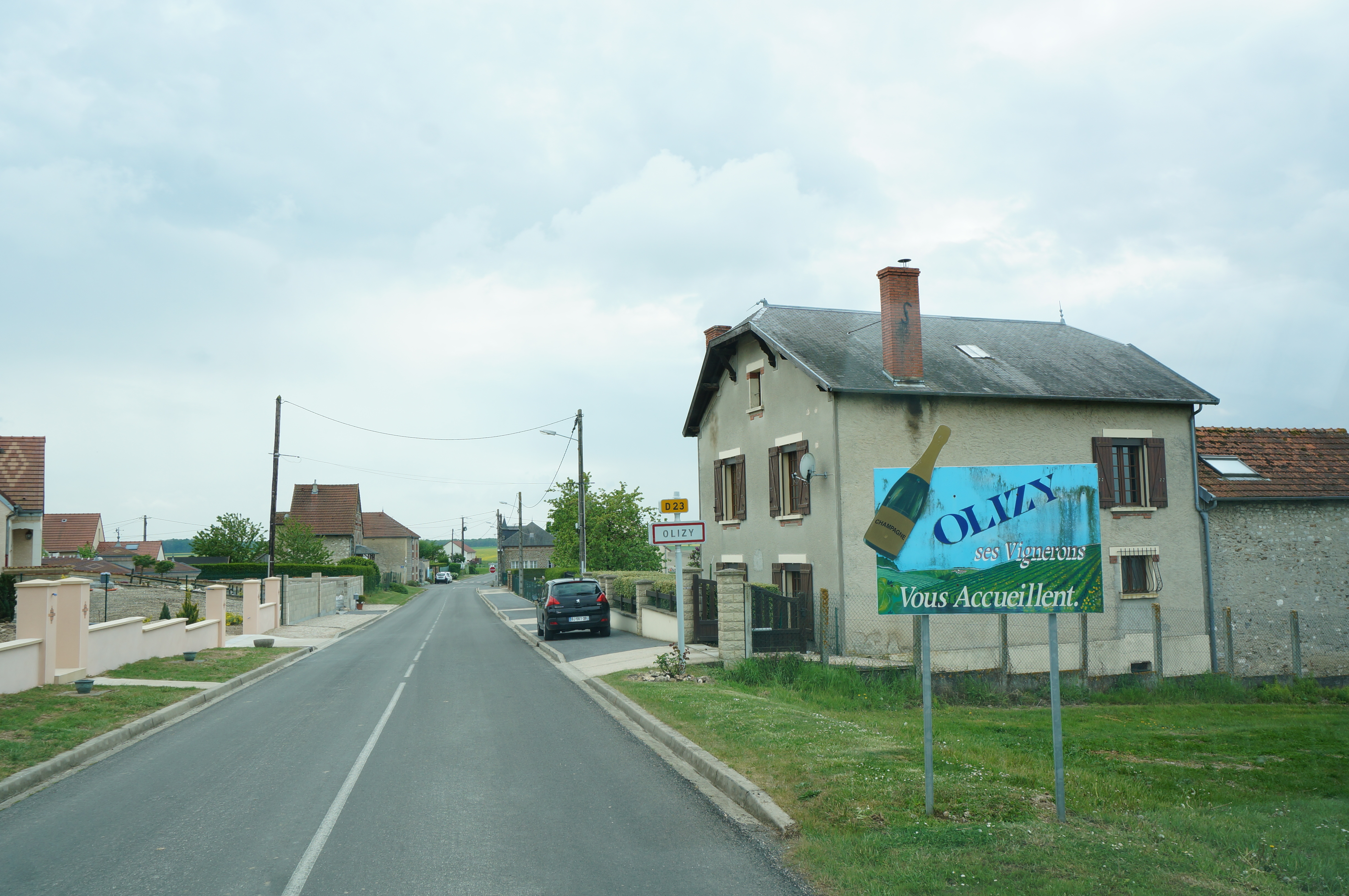 dans le village d'Olizy.